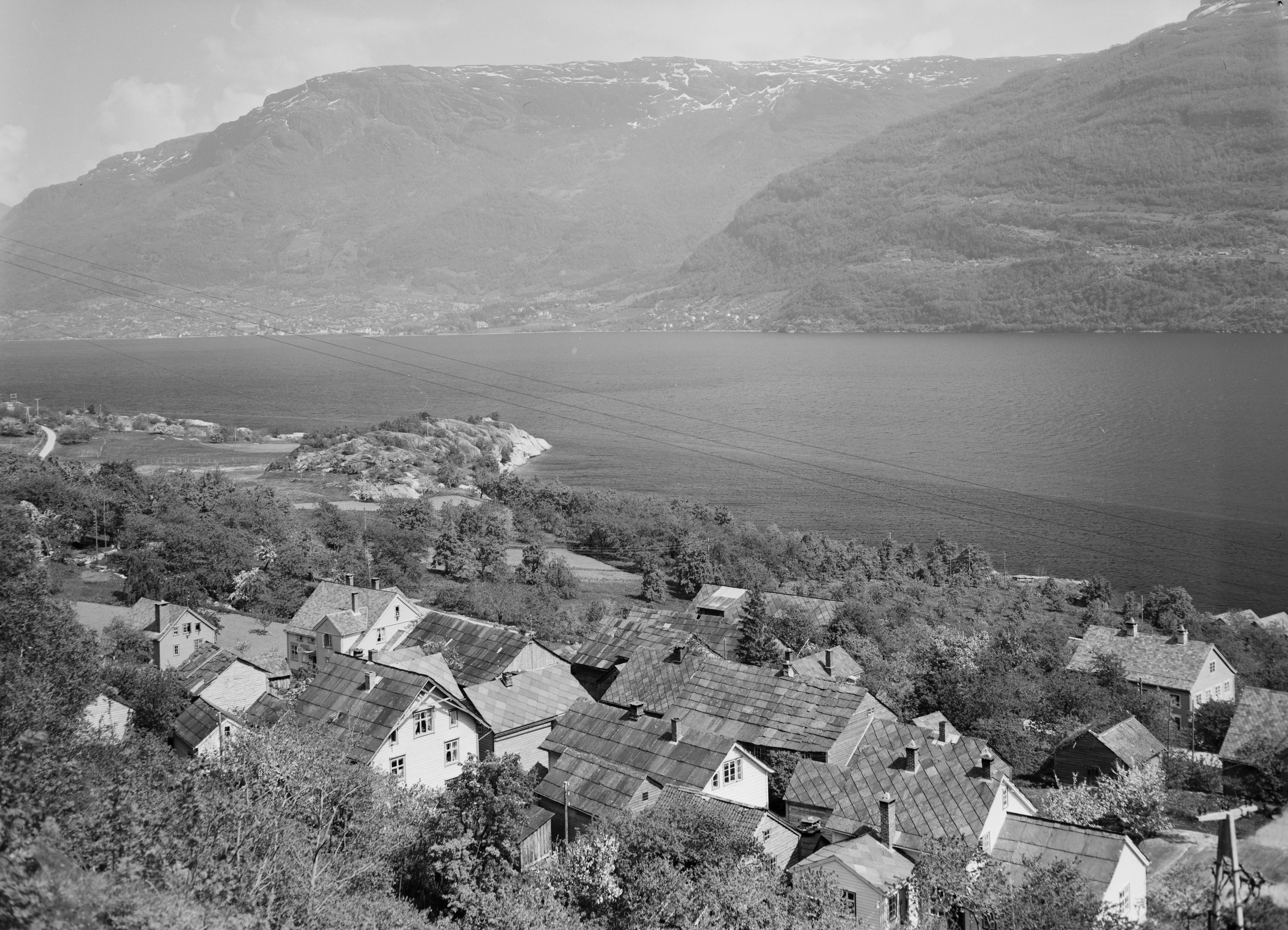 Bildet er hentet fra Nasjonalbibliotekets bildesamling Aga,Hardanger,Sørfjorden, Ullensvang, Hordaland